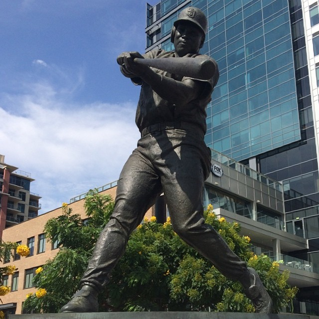 R.I.P., Mr. Padre. #Tony Gwynn